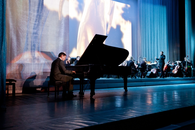 Ректор Университета ИТМО Владимир Васильев